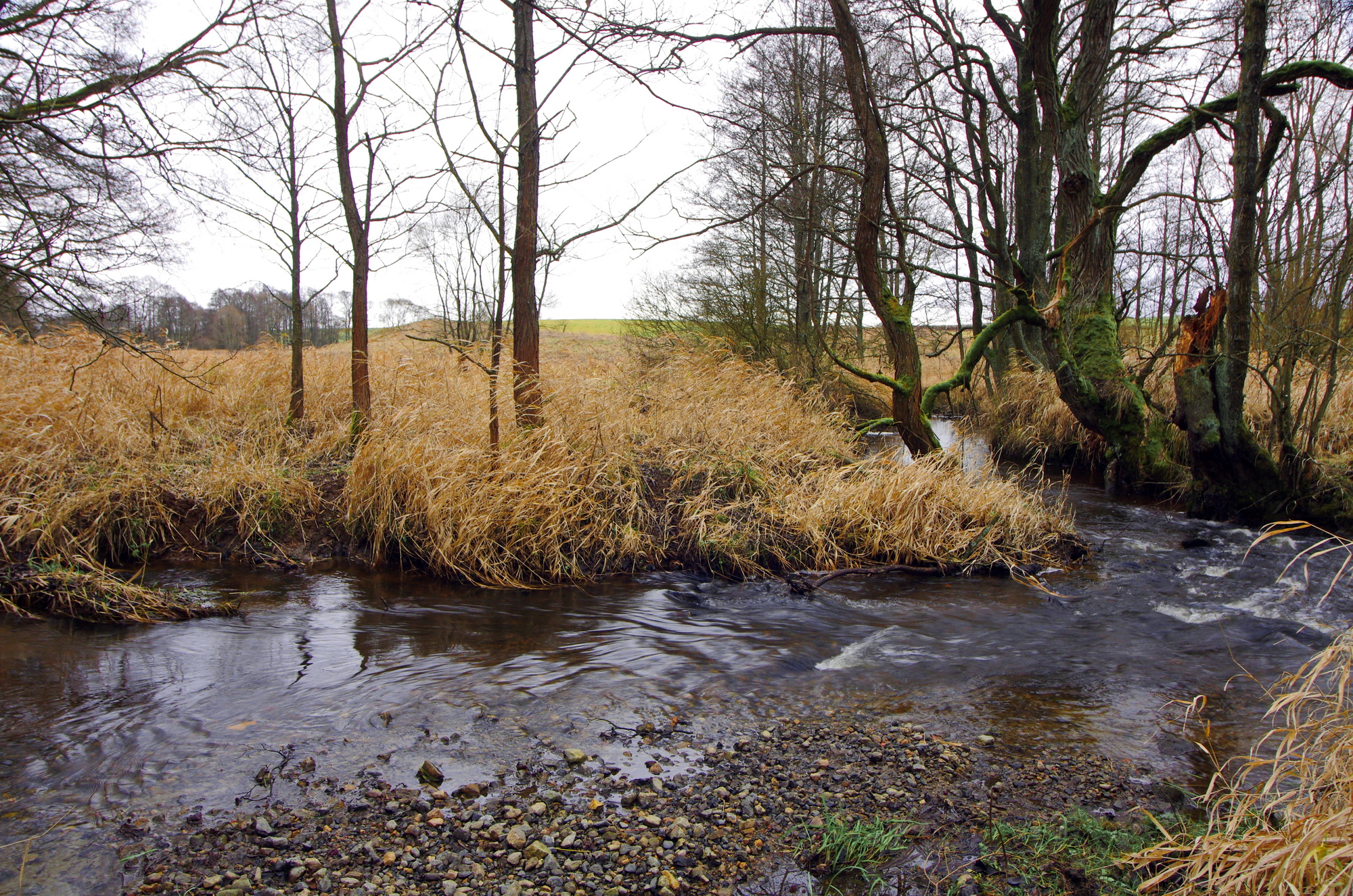 Mnichovský potok nad Mnichovem, Slavkovský les, okres Cheb